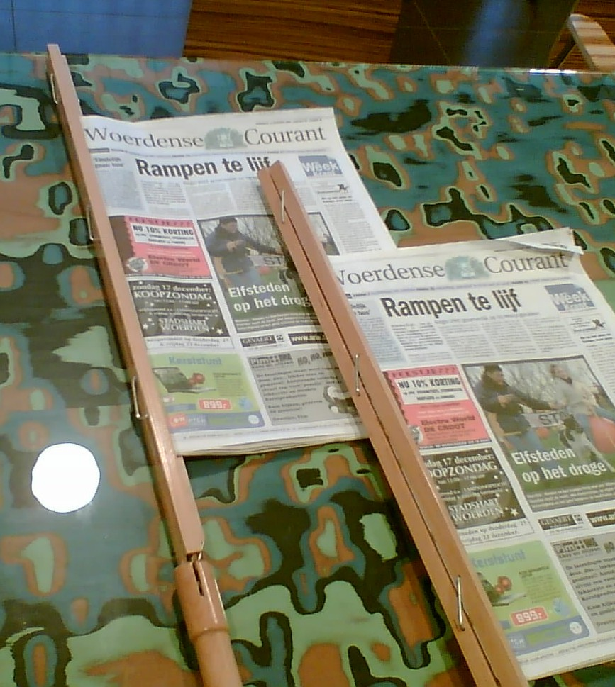 Krantenstok. eigengemaakte opname, 15 dec 2006, op het gemeentehuis van Woerden